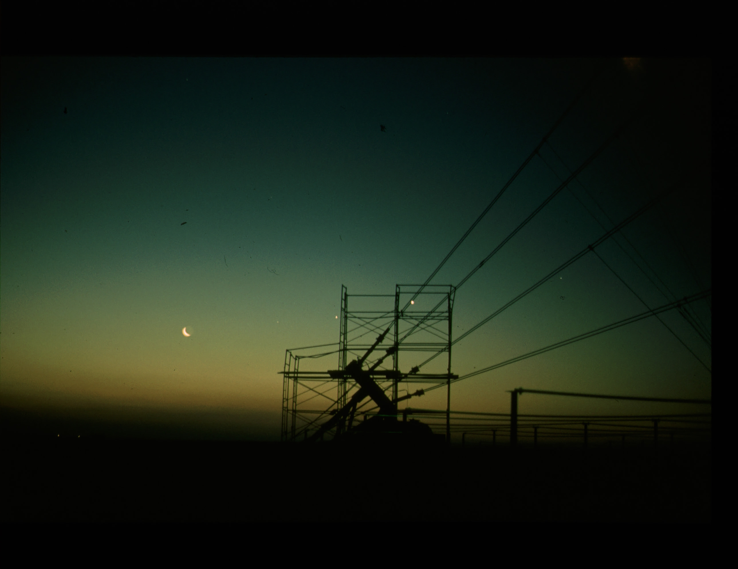 Aufwindkraftwerk Manzanares; Mond über der Turm-Abspannung aus DYWIDAG-Stangen